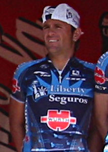 David Etxebarria. Liberty Seguros-Würth, Euskal Bizikleta 2005